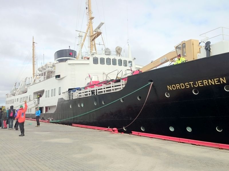 MS Nordstjernen de Hurtigruten en escale à Ny-Ålesund, la localité la plus au nord du monde.